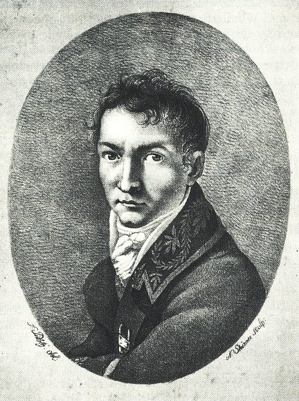 Porträt des deutschen Mediziners Andreas Röschlaub